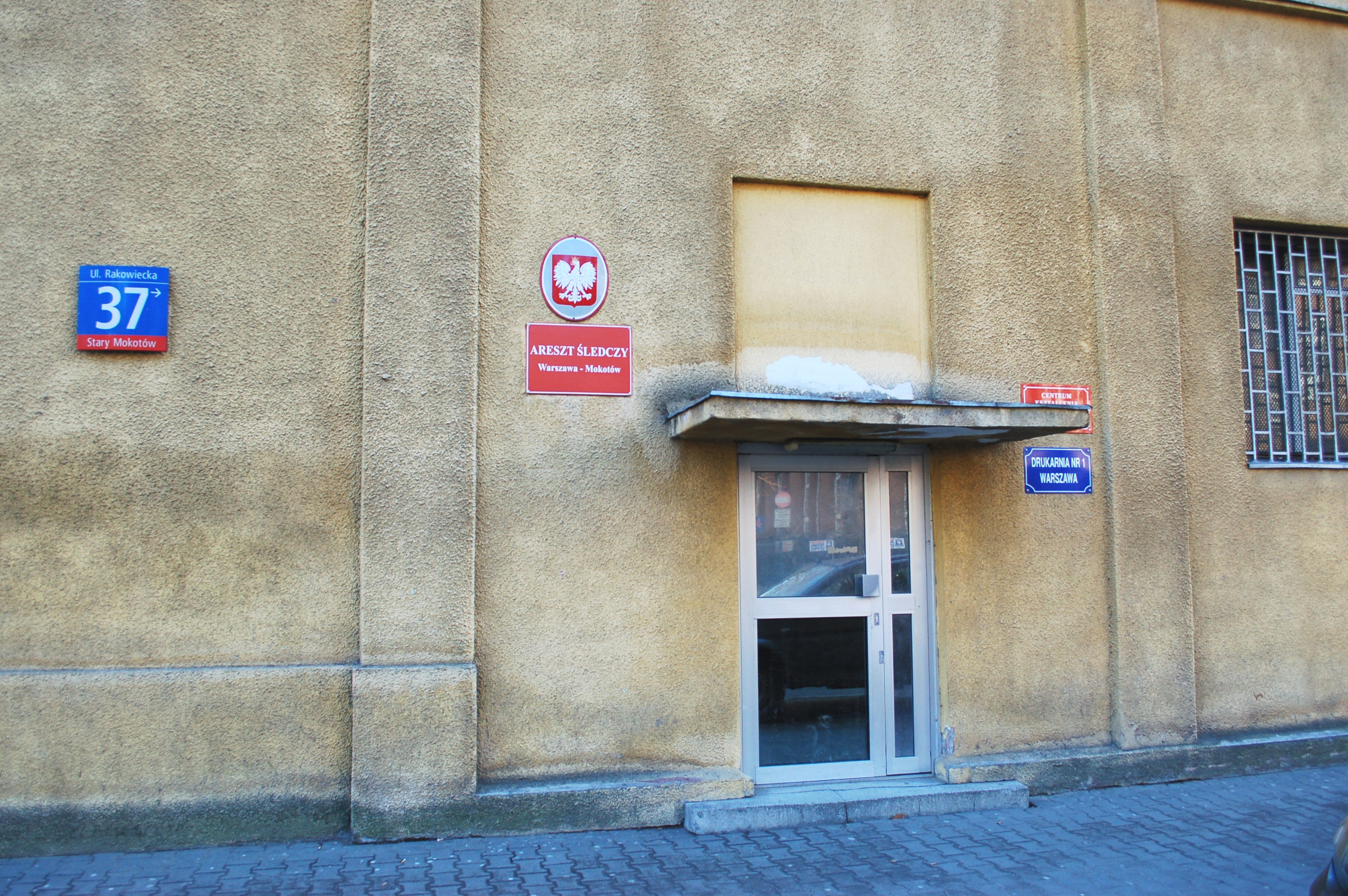 Mokotów Prison